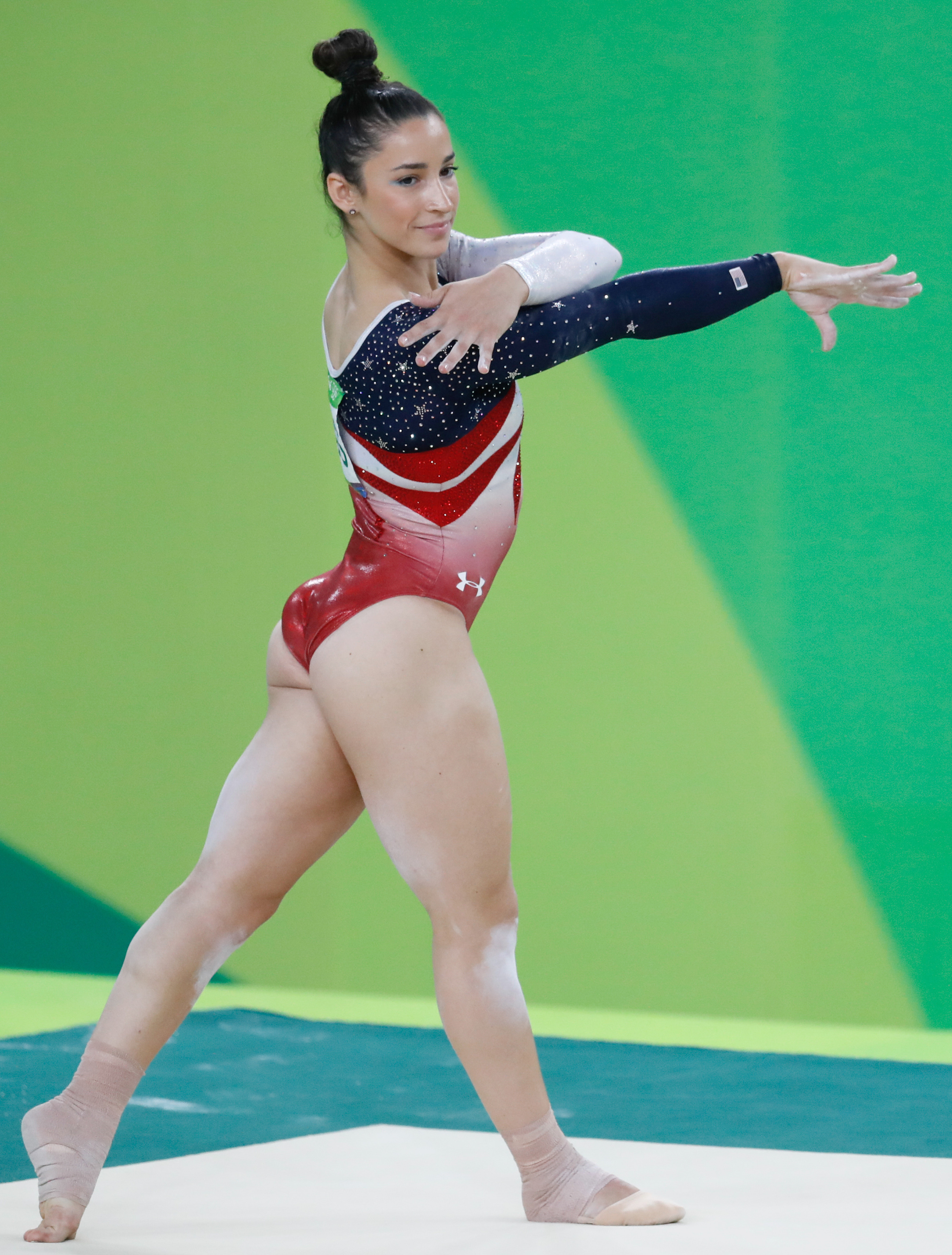 Rio de Janeiro - Aly Raisman, ginasta dos Estados Unidos, durante final em que levou medalha de ouro na disputa por equipes feminina nos Jogos Olímpicos Rio 2016. (Fernando Frazão/Agência Brasil)